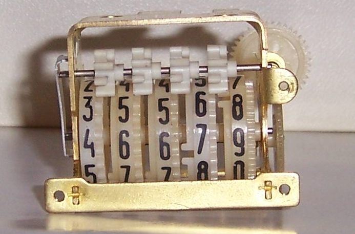 Фотоснимок механического счётчика